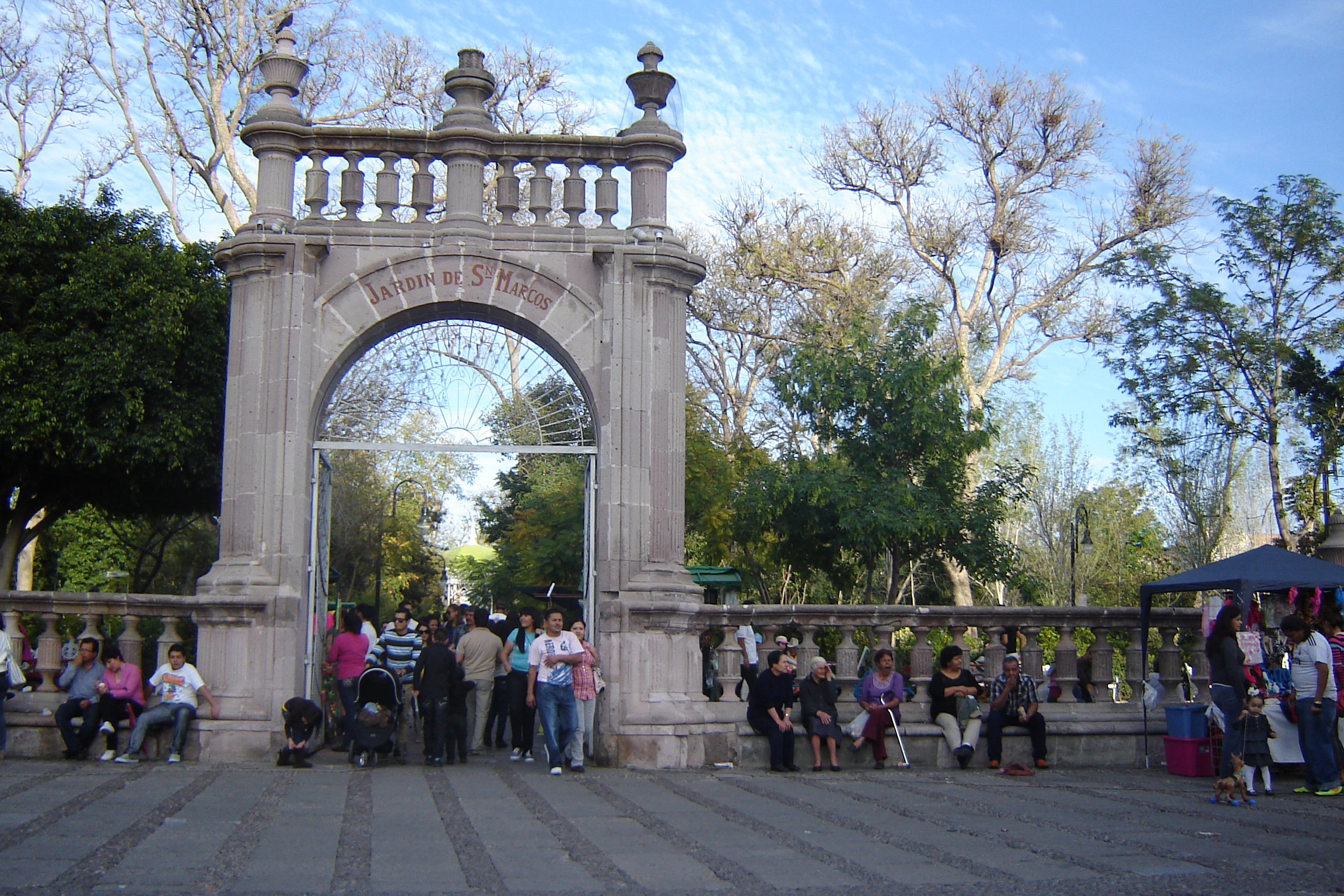 Jardin febrero 2013